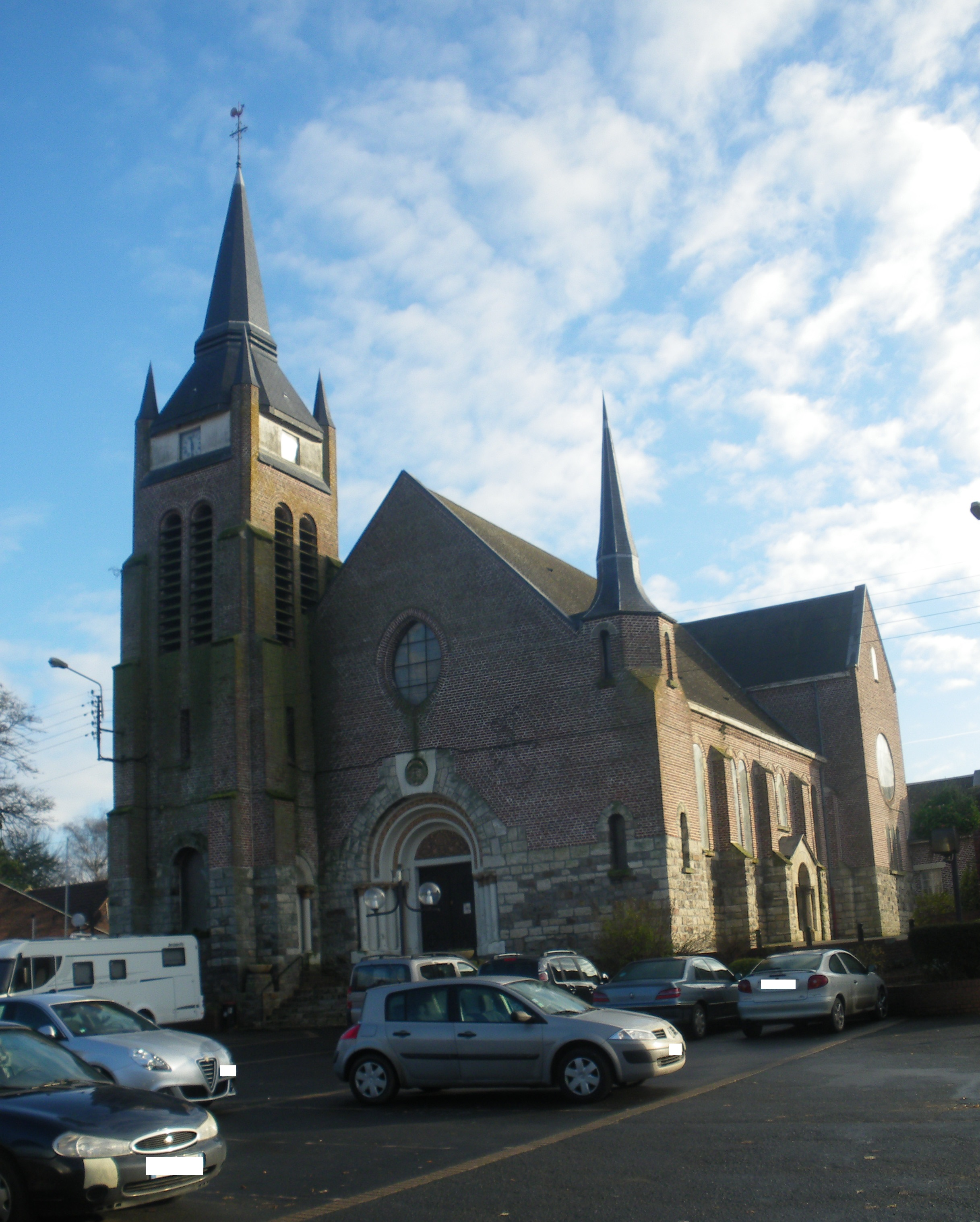 Vue de l'église de Vermelles.